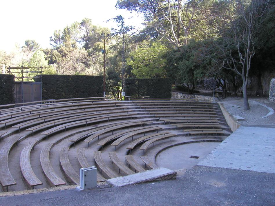 Commune de Robion, Vaucluse, Theatre de verdure